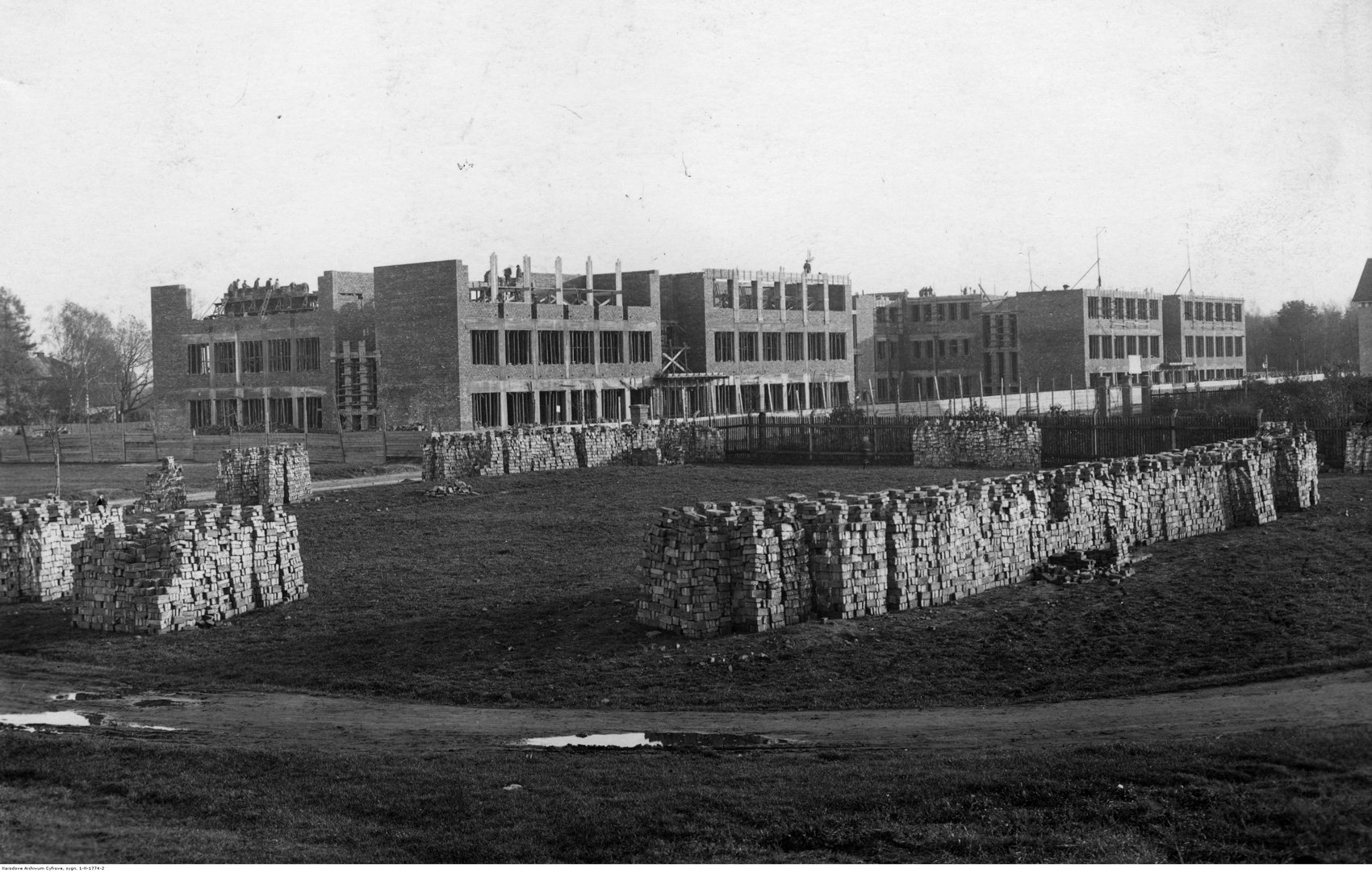 Budowa Szkoły Powszechnej nr 2 w Tarnowskich Górach (1929)